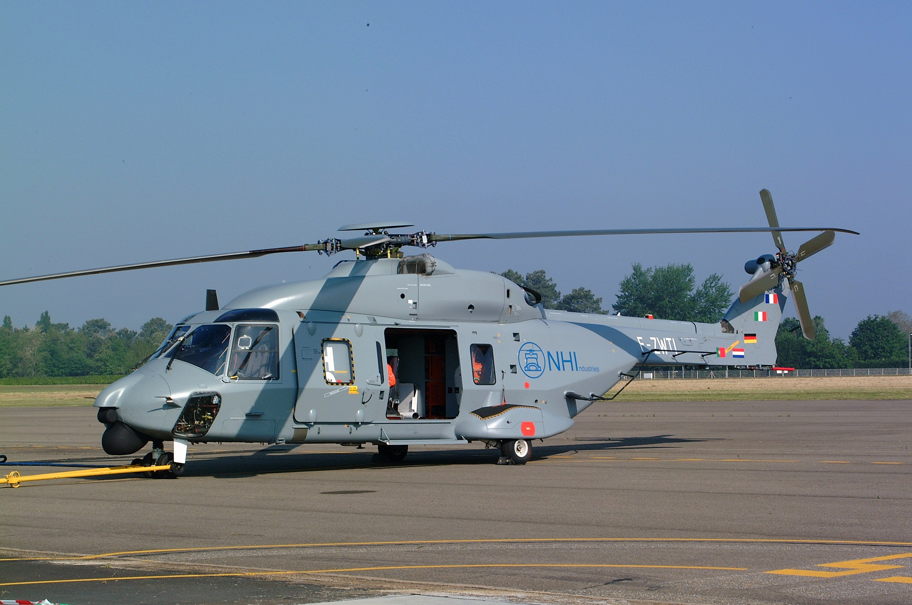 F-ZWTI NH.90 prototype